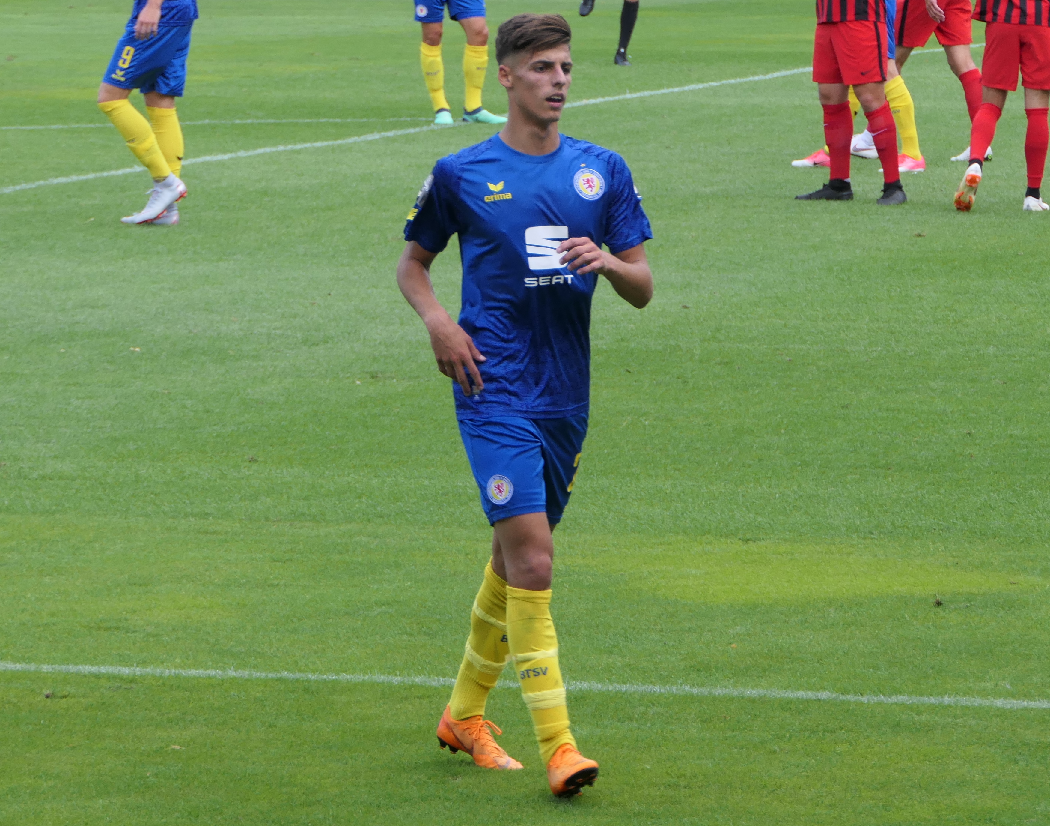 Der Fussballprofi Ivan Franjic im Trikot von Eintracht Braunschweig beim Auswärtsspiel beim SV Wehen Wiesbaden am 11.08.2018.